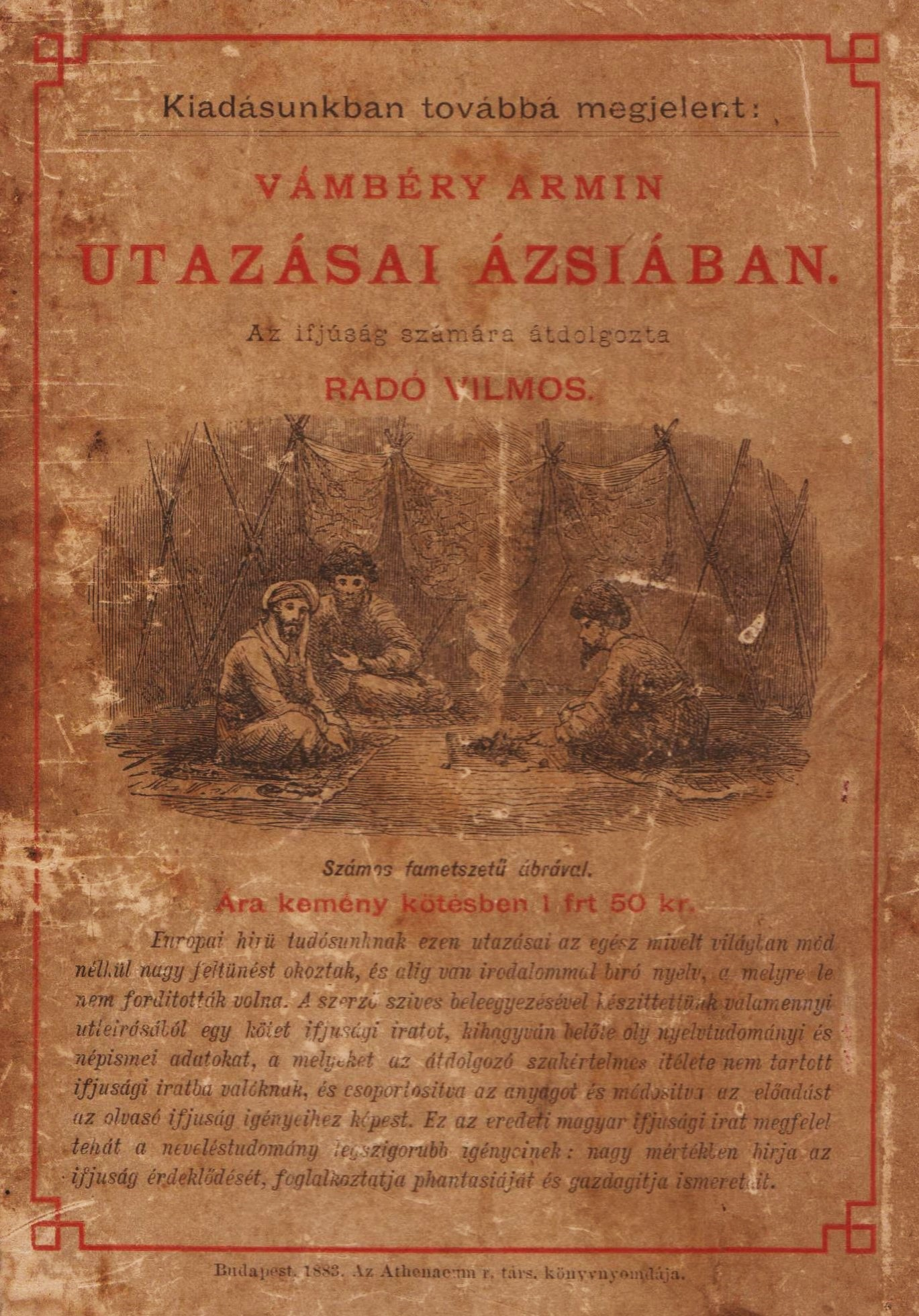 korabeli hirdetés IN Ferdinand Colon: Columbus Kristóf élete és Amerika felfedezése kép